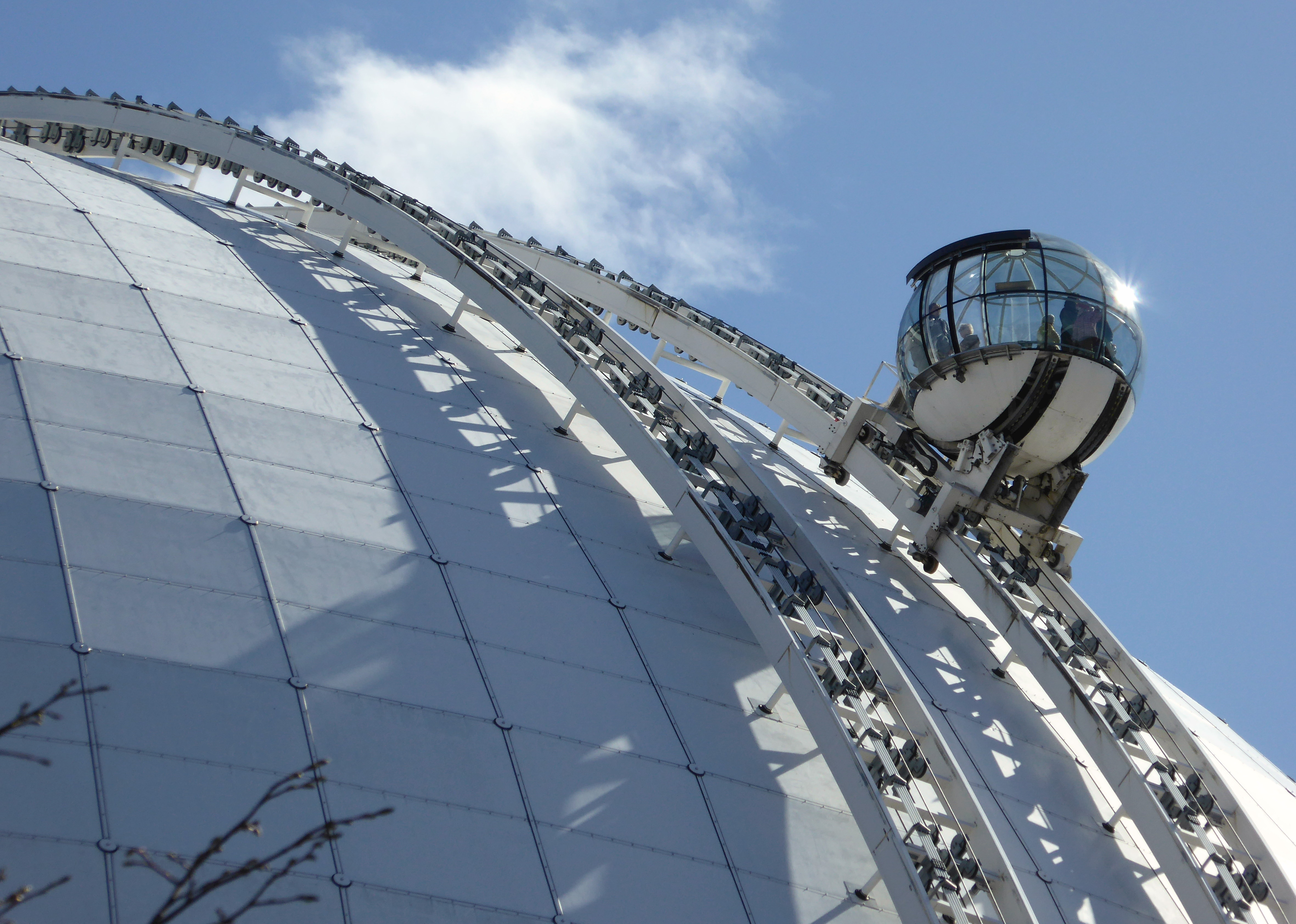 Globens gondolbana